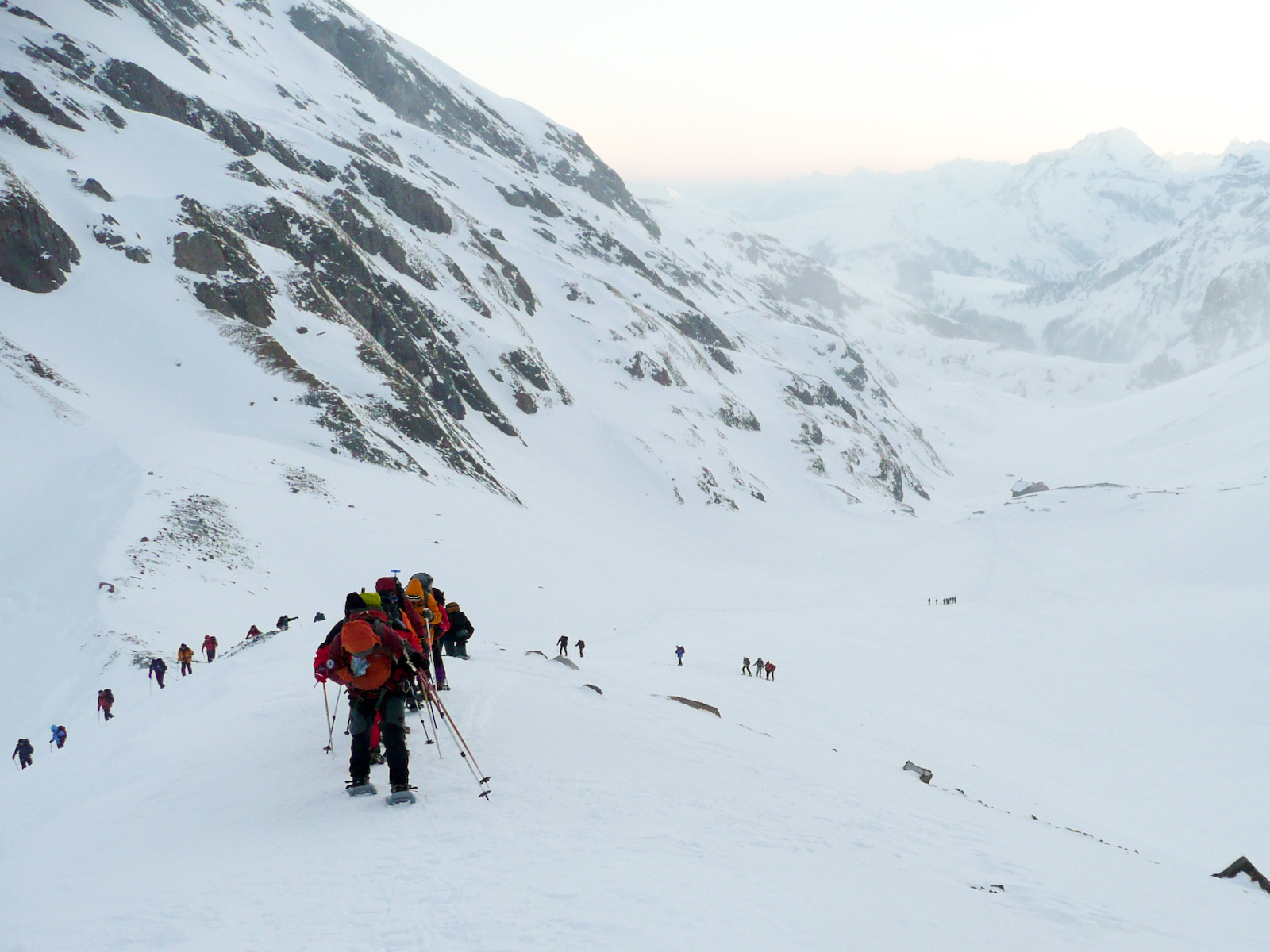 An schönen Wochenenden startet eine lange Karawane von Skifahrern und Schneeschuhläufern von der Wildhornhütte in Richtung Wildhorn.